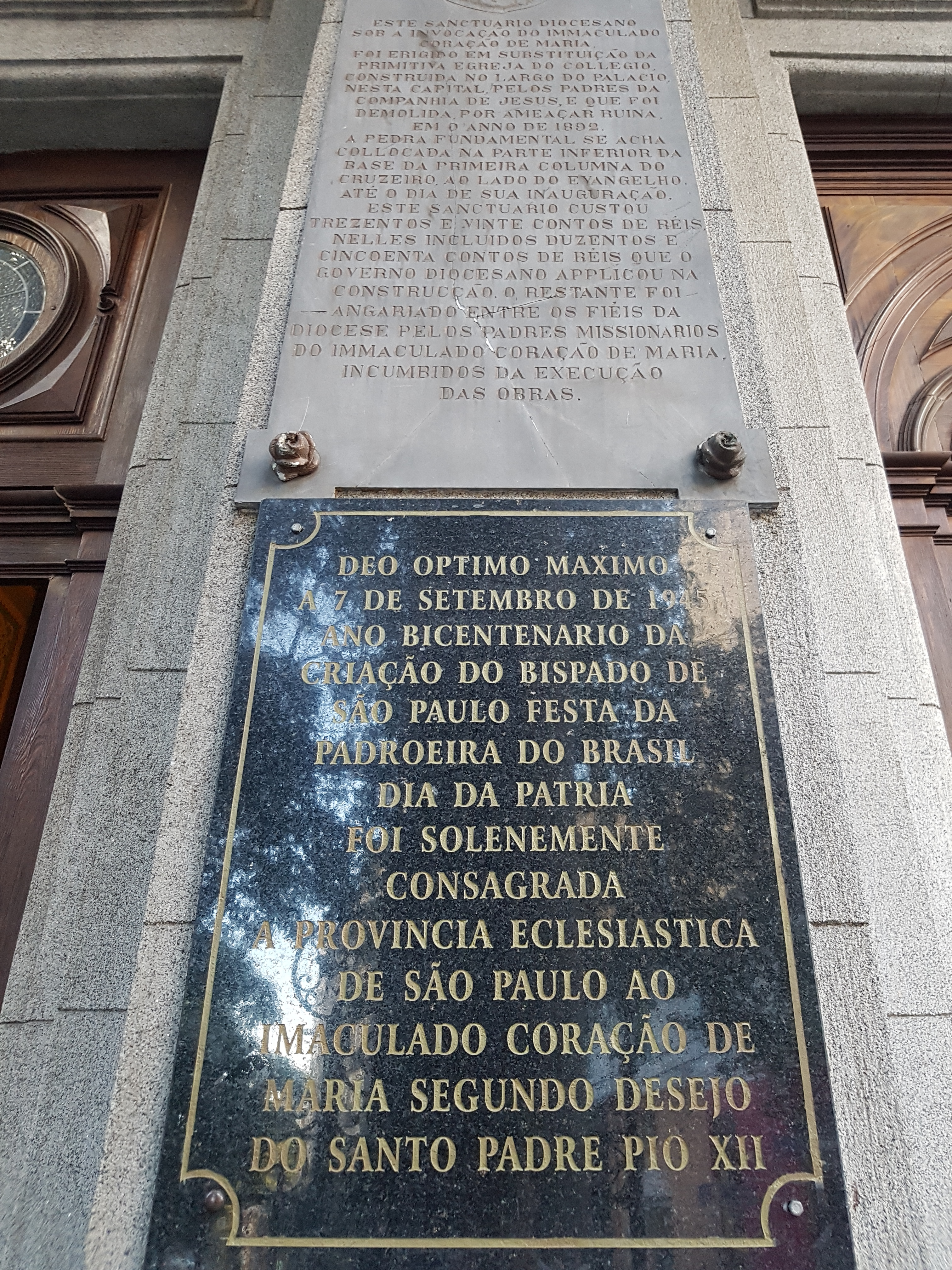 Placa da criação da Paróquia Imaculado Coração de Maria.